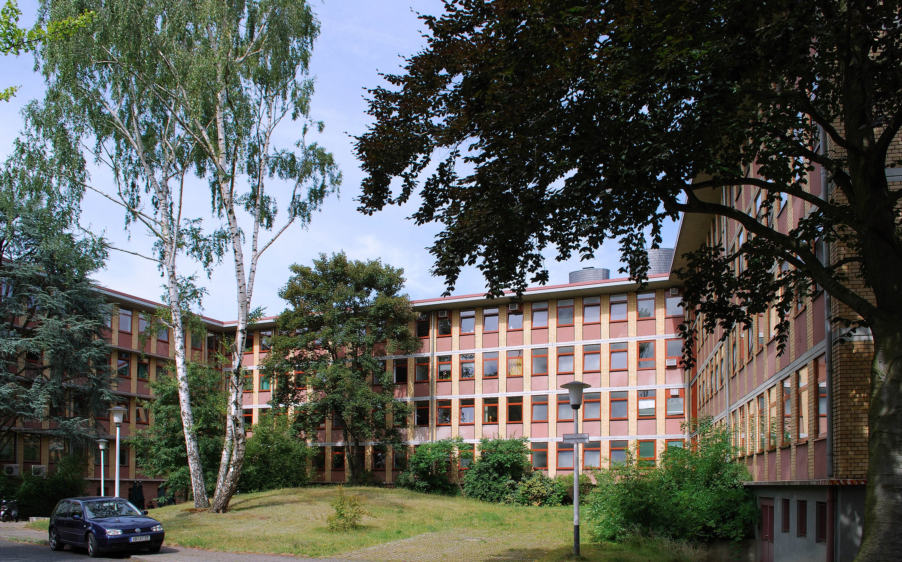 Hauptstelle der Bundesmonopolverwaltung für Branntwein, Friedrichsring 35 in 63069 Offenbach am Main